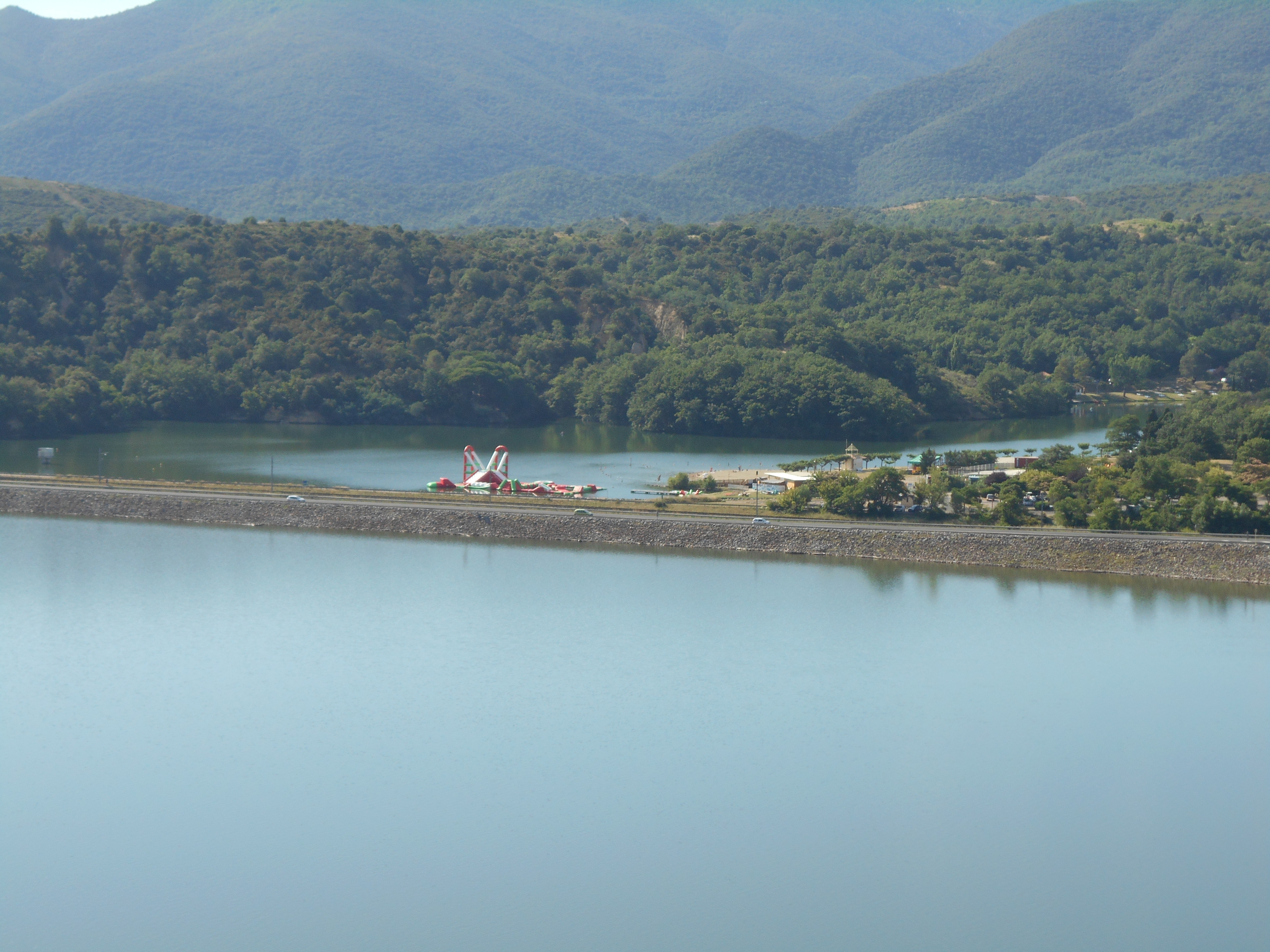 Embassament de les Escomes, ran del Pantà de Vinçà